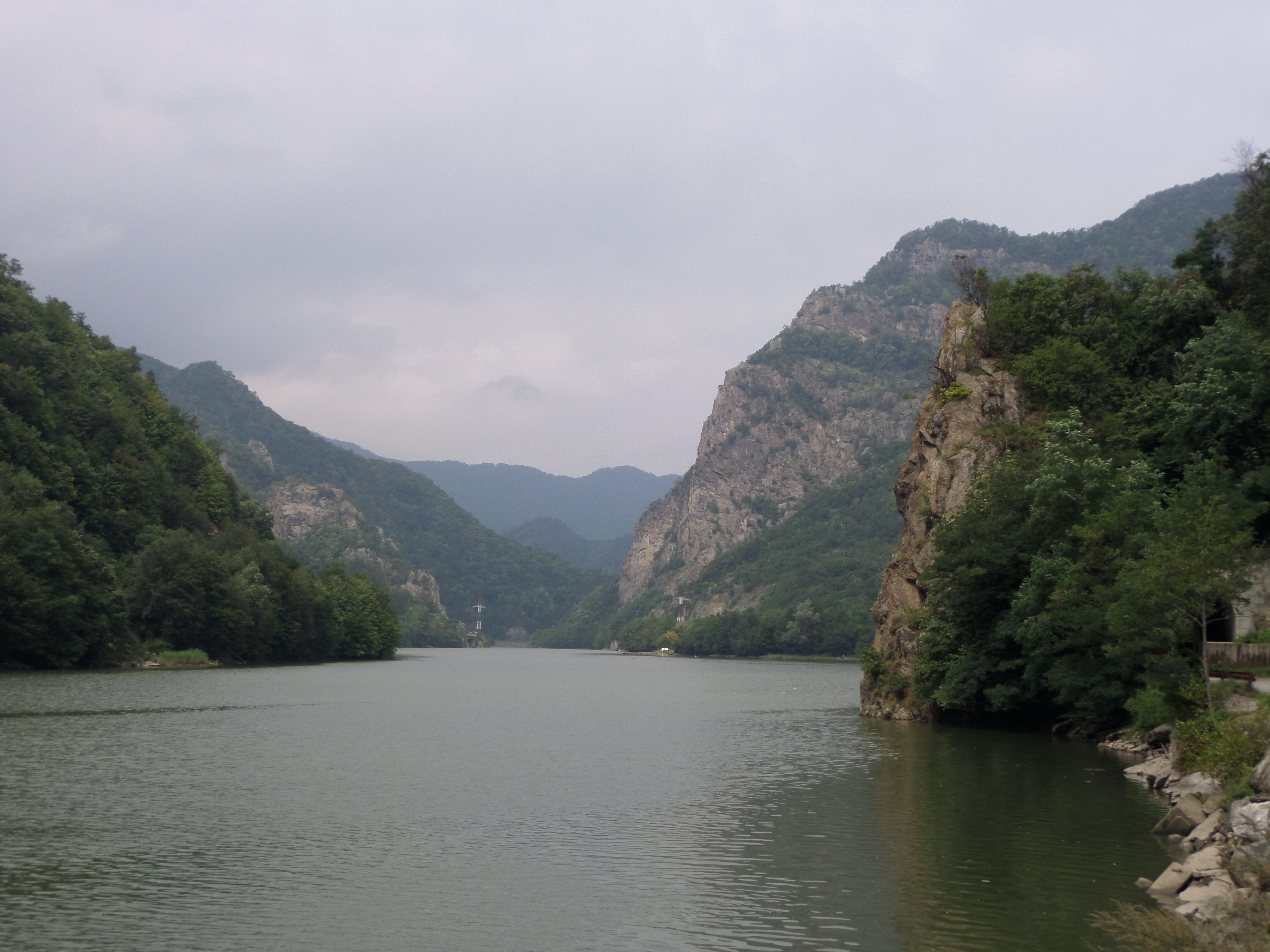 Raul Olt-Valea Oltului-Judetul Valcea